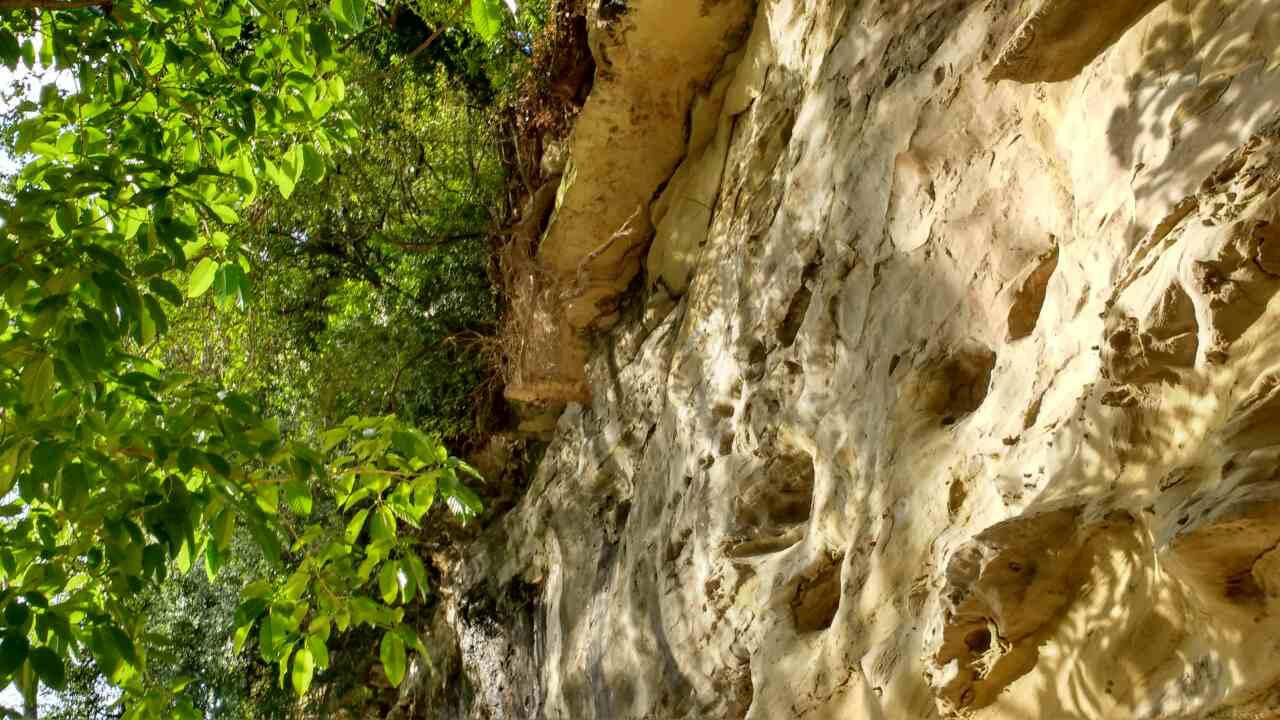 Paredão Salitroso - segundo estudo realizado pelos estudantes da Unimonte (Centro Universitario Monte Serrat) da cidade de Santos (SP). Liderados pela Doutora Samara Cazzioli y Goya em 2016, sua idade é de 400 milhões de anos